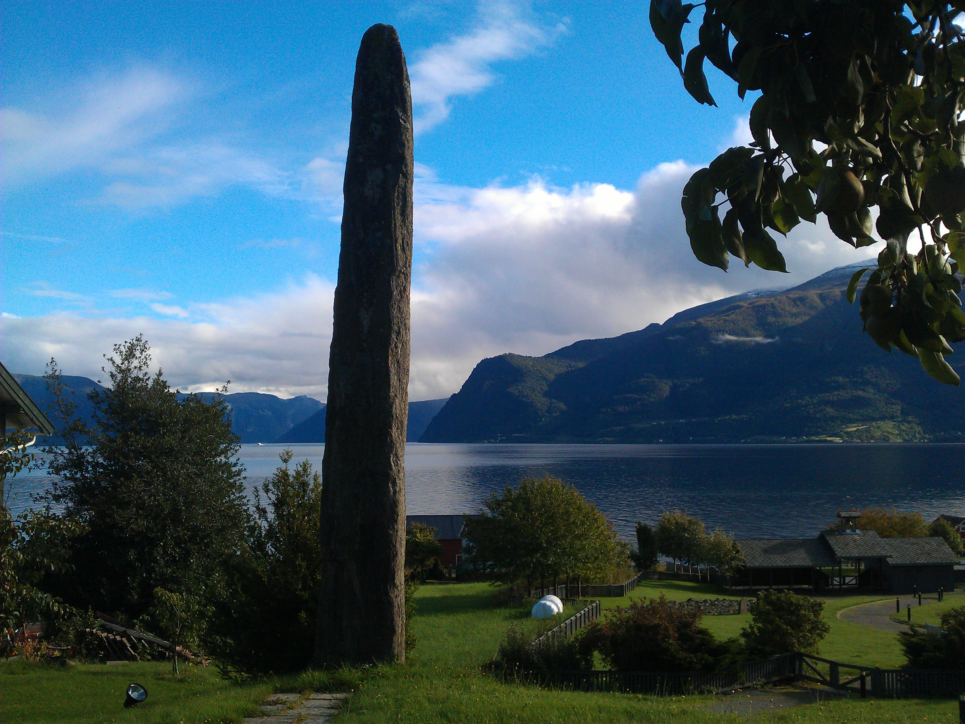 Baldersteinen er ein nær 7,8 meter høg bautastein på Husabø i Leikanger kommune. I bakgrunnen er Sognefjorden.